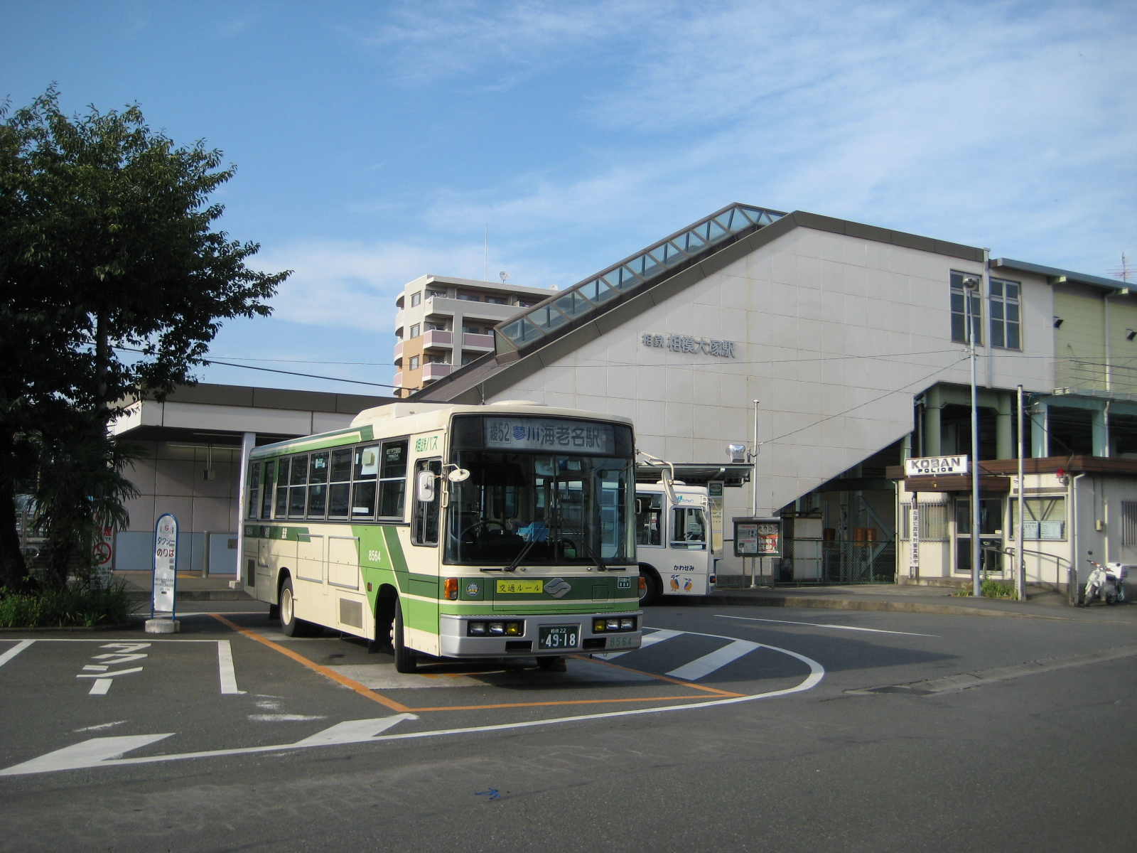 Sagami-Otsuka Station, on the Sotetsu Main Line, Yamato, Kanagawa 模大塚駅